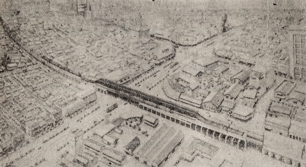 柳橋駅想像図（1952年当時の計画）